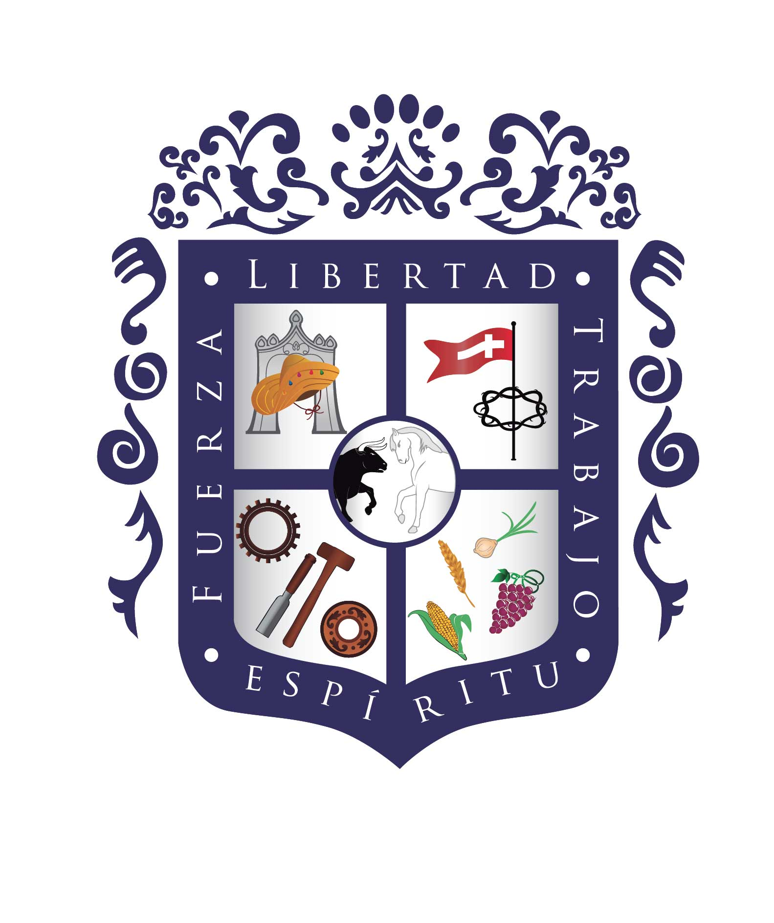 El nombre y el Escudo del Municipio son el signo de identidad y símbolo representativo del Municipio, respectivamente. El Municipio conserva su nombre actual de “Jesús María” el cual no podrá ser cambiado, sino por acuerdo unánime del Ayuntamiento y con la aprobación de la Legislatura del Estado. La descripción del escudo del Municipio de Jesús María, las figuras representadas en los diferentes cuadros, son la Tradición, Industria, Ganadería y Agricultura: 1. Tradición: El cuadrante superior izquierdo representa el vestuario tradicional de los hombres que acompañaron a Santo Santiago. 2. Religión: El cuadrante superior derecho representa en sí la religión por medio de la corona de Jesucristo Y el estandarte del Santo Santiago, que representa las festividades que se celebran en esta ciudad. 3. Ganadería: En el círculo central la figura representa la actividad ganadera de la región. 4. Industria: En el cuadrante inferior izquierdo la figura representa la actividad económica industrial de la región. 5. Agricultura: En el cuadrante inferior derecho la figura representa la principal actividad agrícola de la región. En el Municipio de jesús María son símbolos obligatorios la Bandera, el Himno y Escudo Nacionales, así como el Escudo y el Himno del Estado de Aguascalientes.